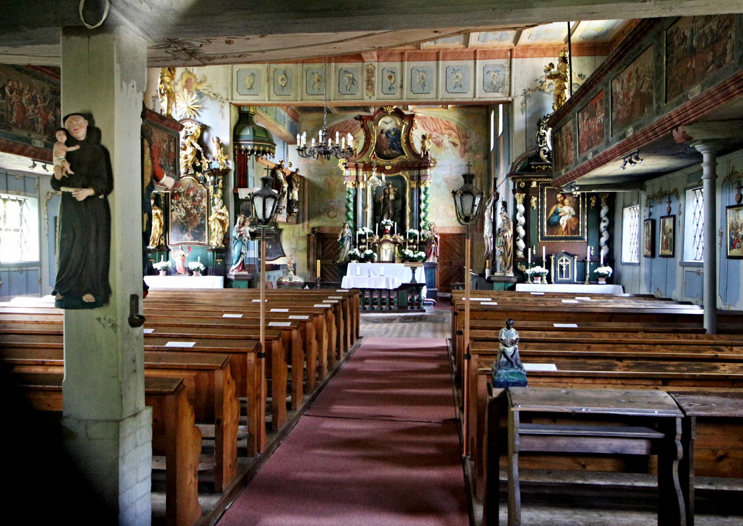 Kryštofovo údolí, hřbitovní kostel sv. Kryštofa s márničkou a farou